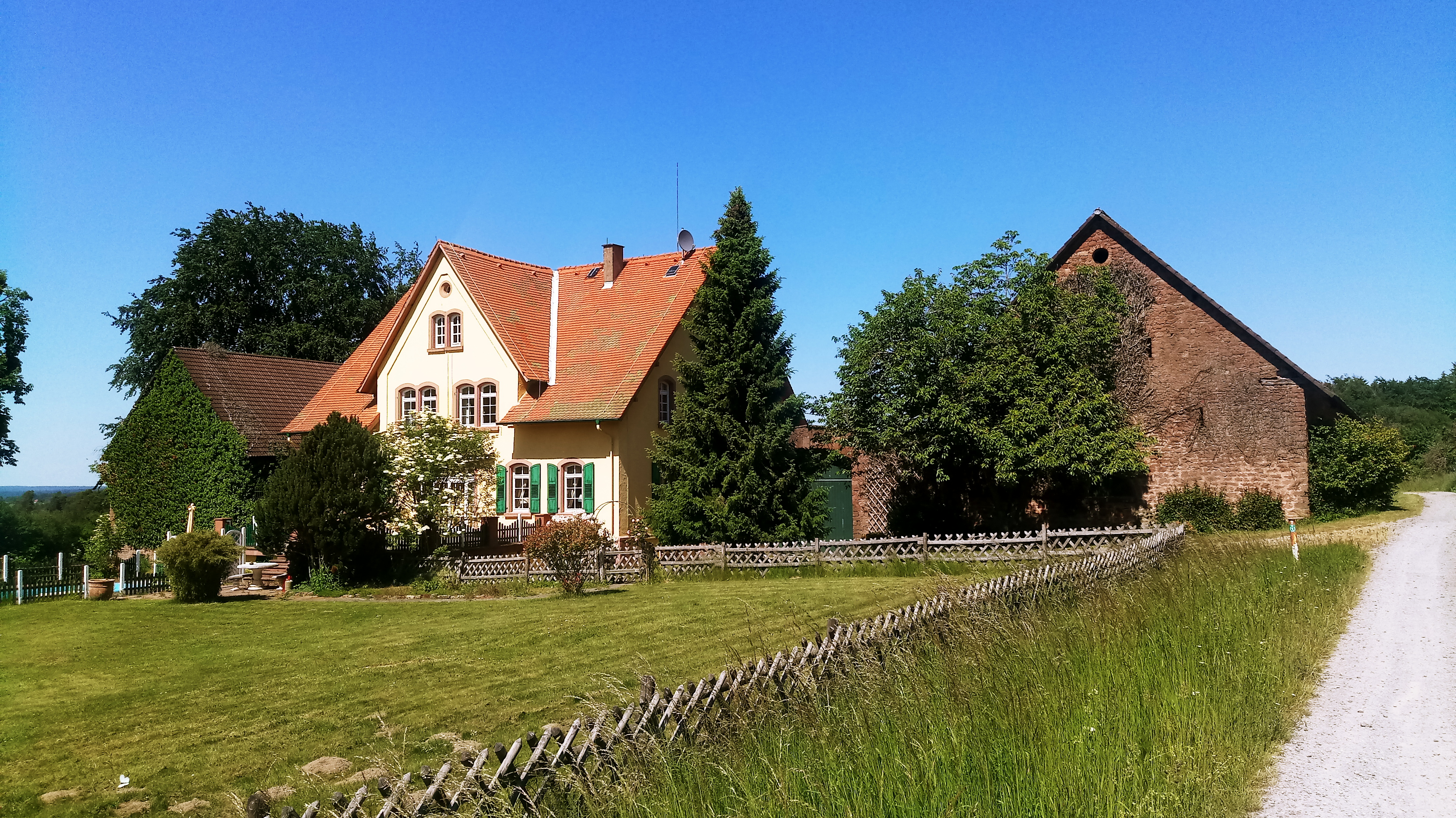 Baudenkmal: 5,1 km nordöstlich von Erbach, Forsthaus Habrich, ein 1863 von Graf Eberhard zu Erbach-Erbach gegründetes herrschaftliches Hofgut, das im Laufe des 19. Jahrhunderts weiter ausgebaut wurde. Historische Namensformen: Habrigs Haus [Generalstabskarte Großherzogtum Darmstadt 1832-1850] Habrich, Forsthaus Forsthaus Habrich